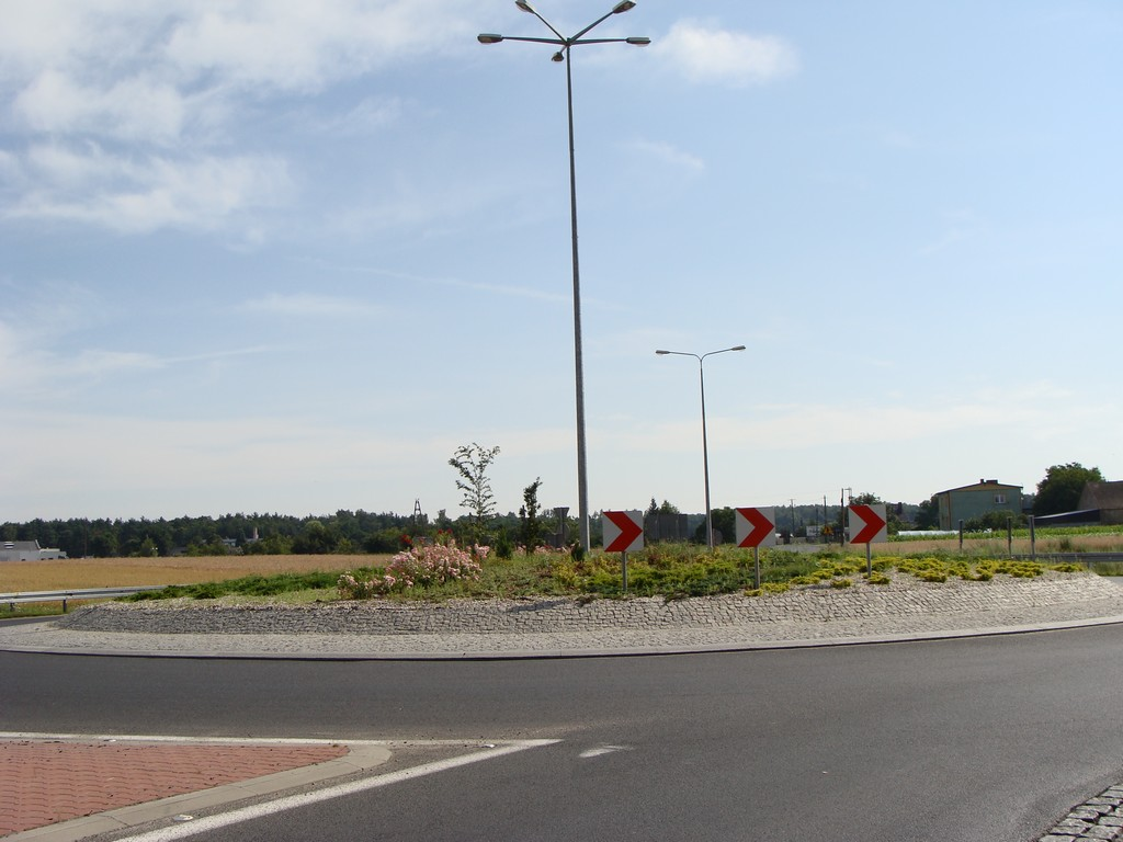 Rondo przy obwodnicy Śremu jako skrzyżowanie dróg wojewódzkich 432 i 434.